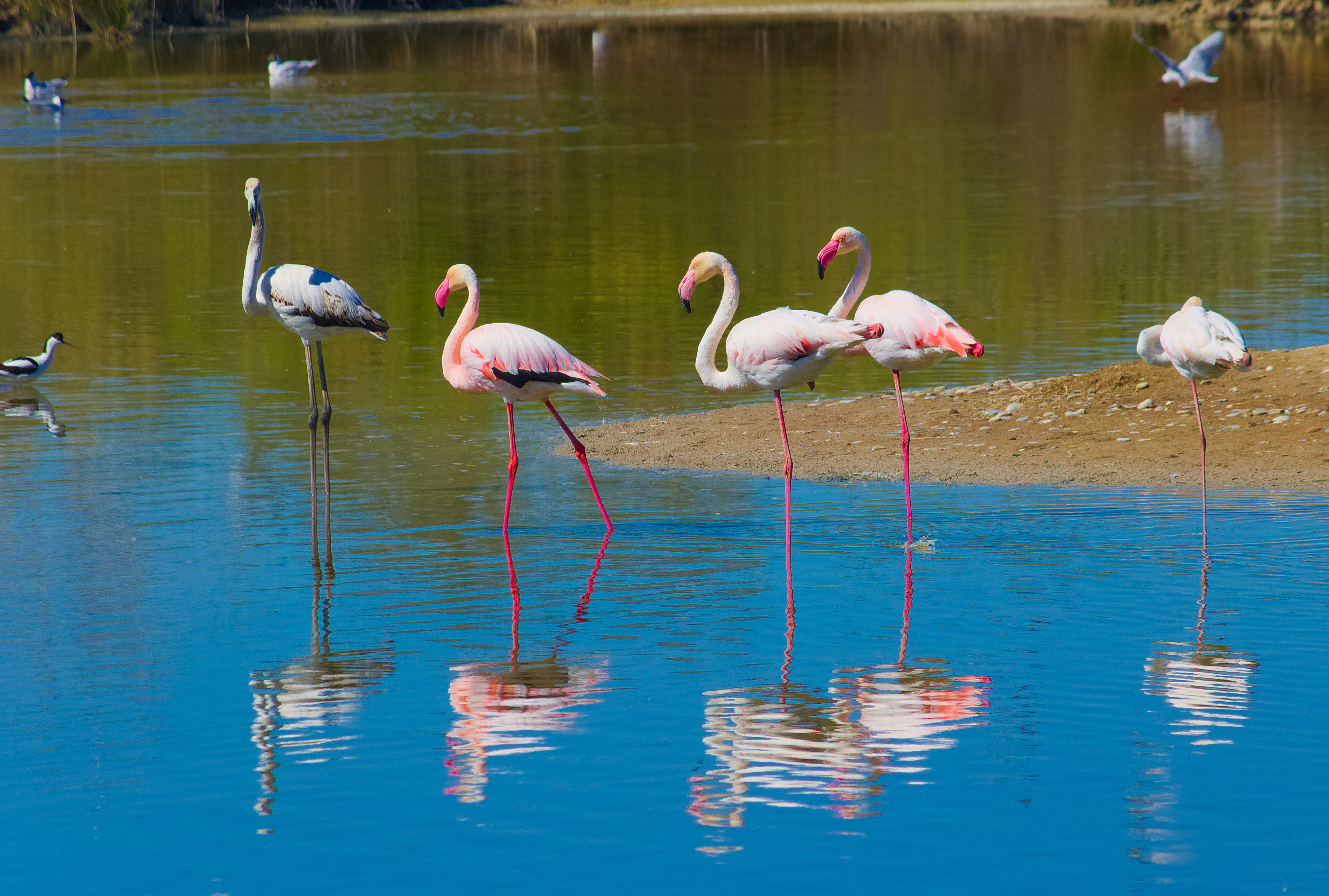 La Albufera This is a photography of a Site of Community Importance in Spain with the ID: ES0000023. Natura2000 entry, EEA entry